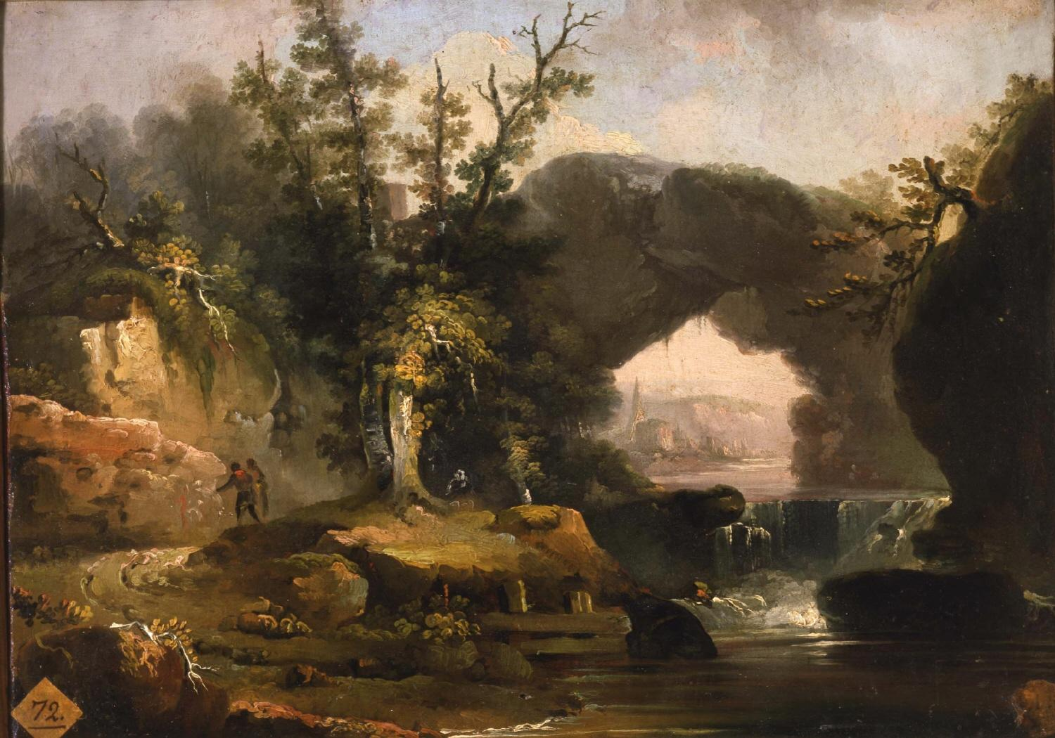 La obra representa un paisaje con cascada.